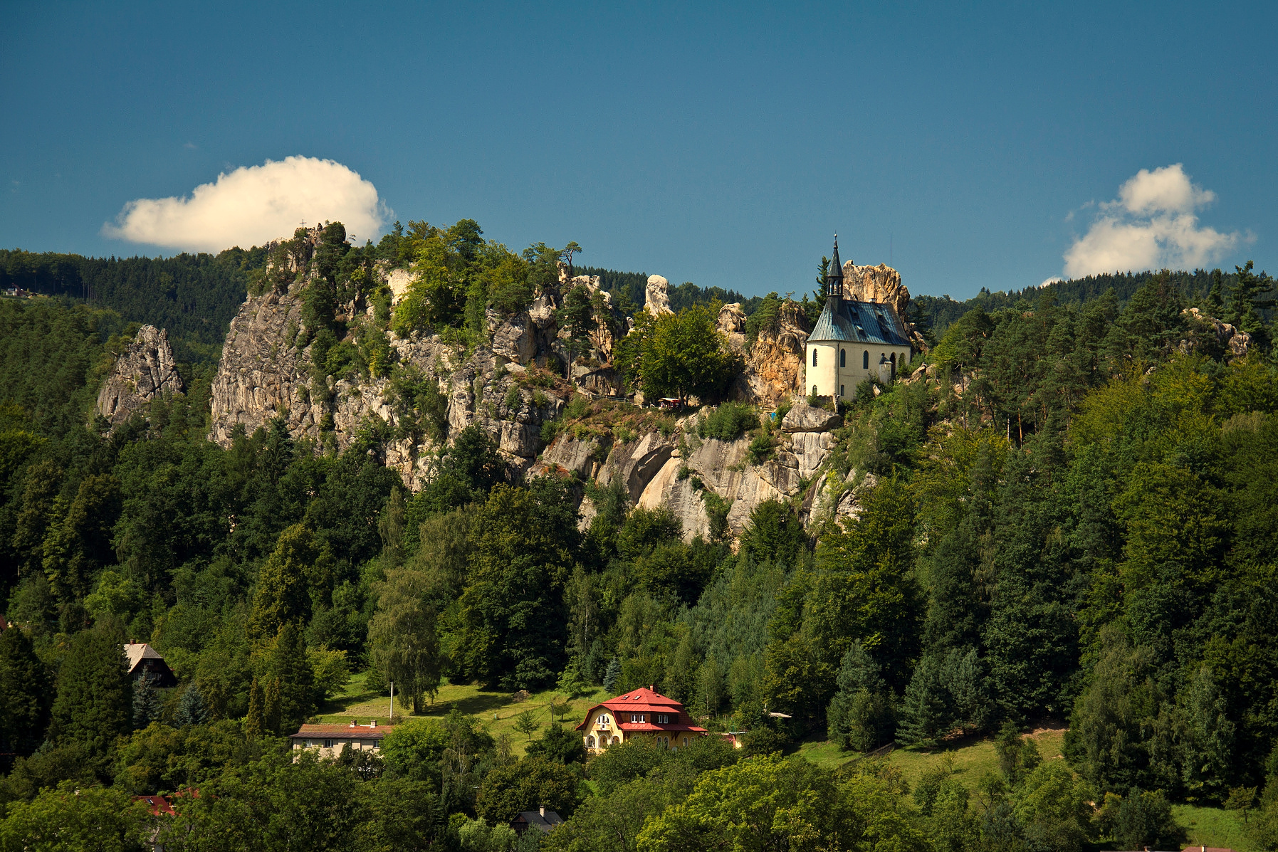 Hrad Vranov, zřícenina (Malá Skála), Malá Skála